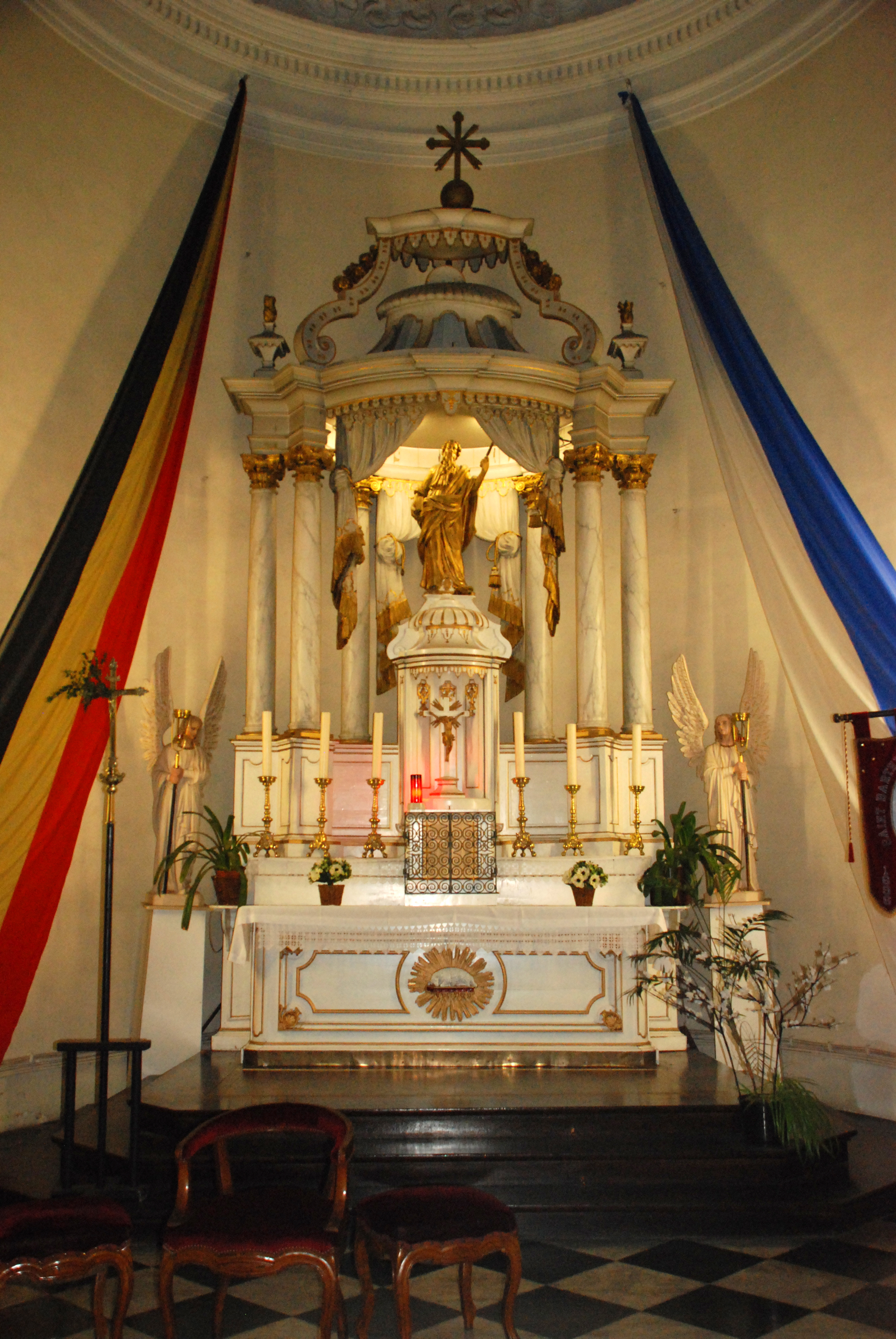 Belgique - Bousval - Église Saint-Barthélemy de Bousval